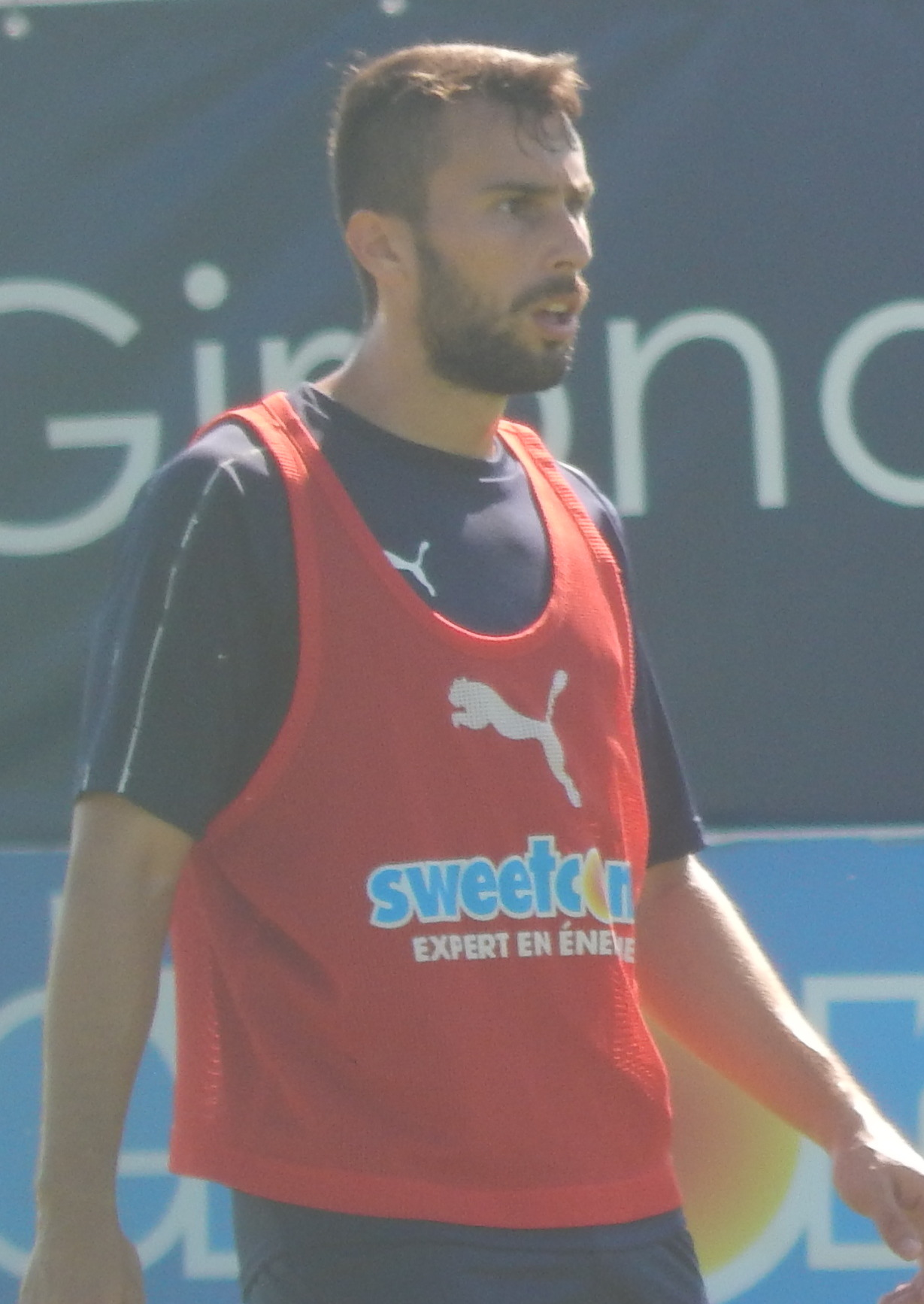 Milan Gajić à l'entraînement avec les Girondins de Bordeaux le 23 juillet 2018.